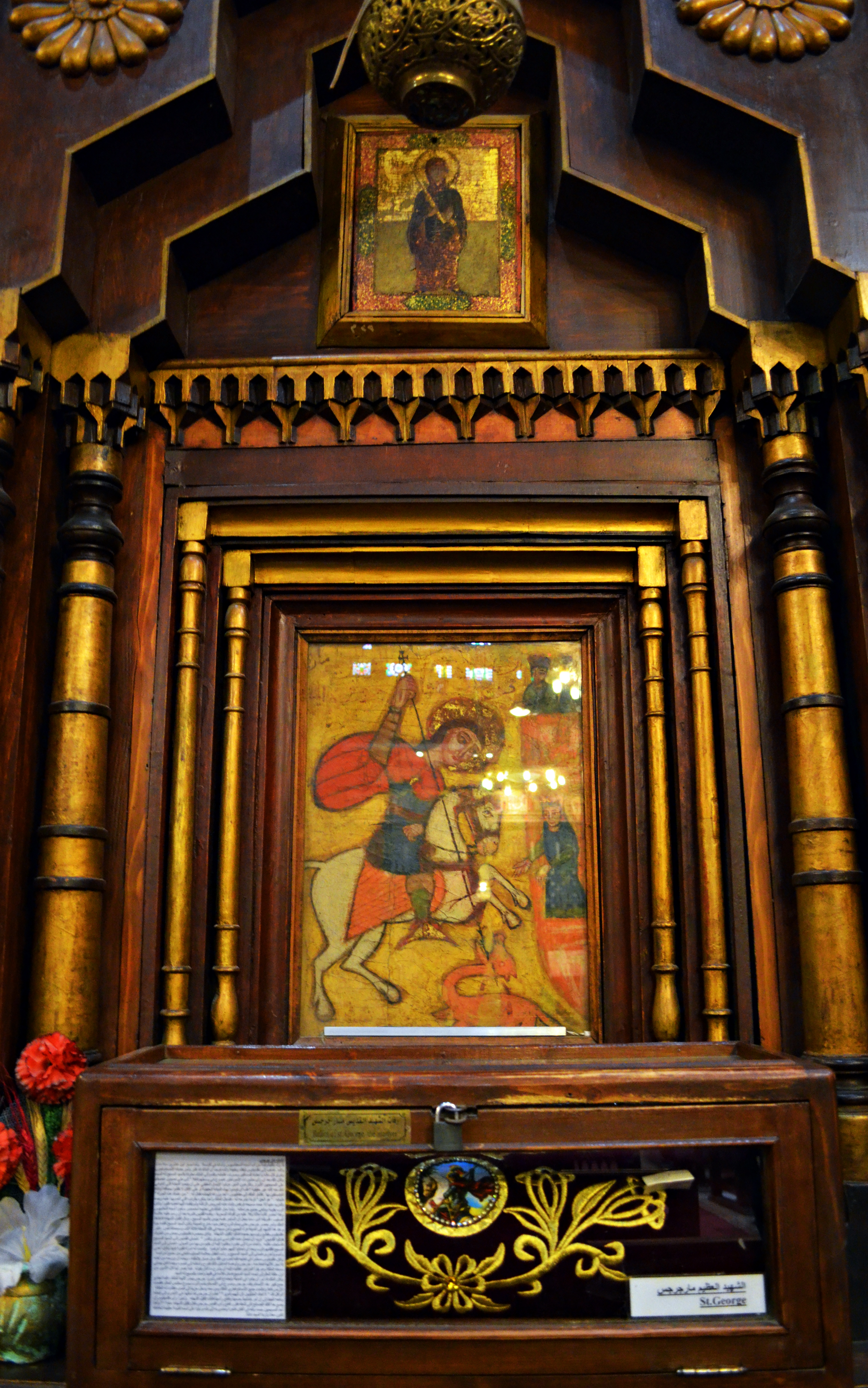 رفات القديس مار جرجس، القاهرة، مصر